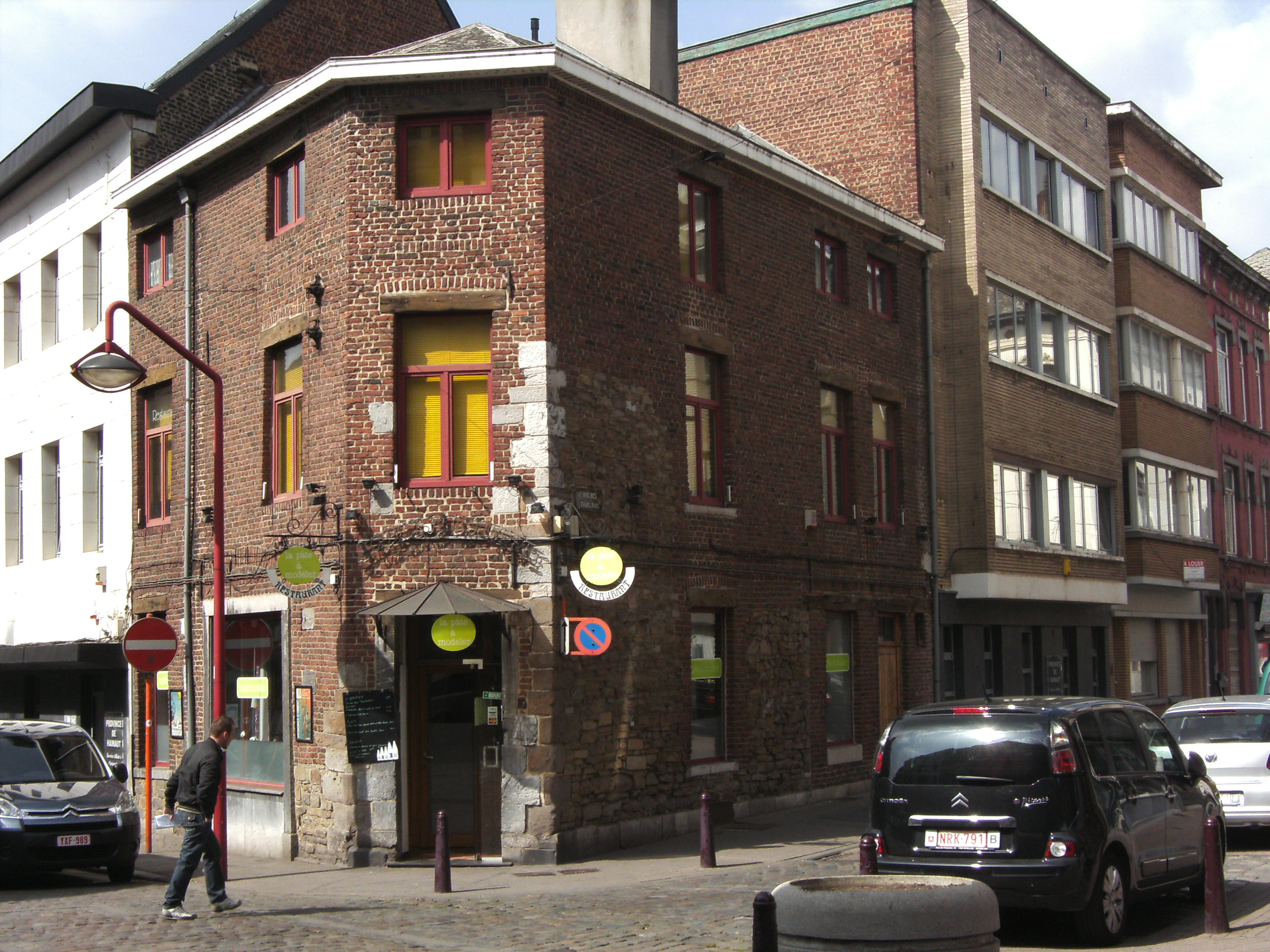 Charleroi (Belgique) - Rue de la Régence : immeuble conservant dans la façade des pierres antérieures à sa destruction durant le siège de 1693.